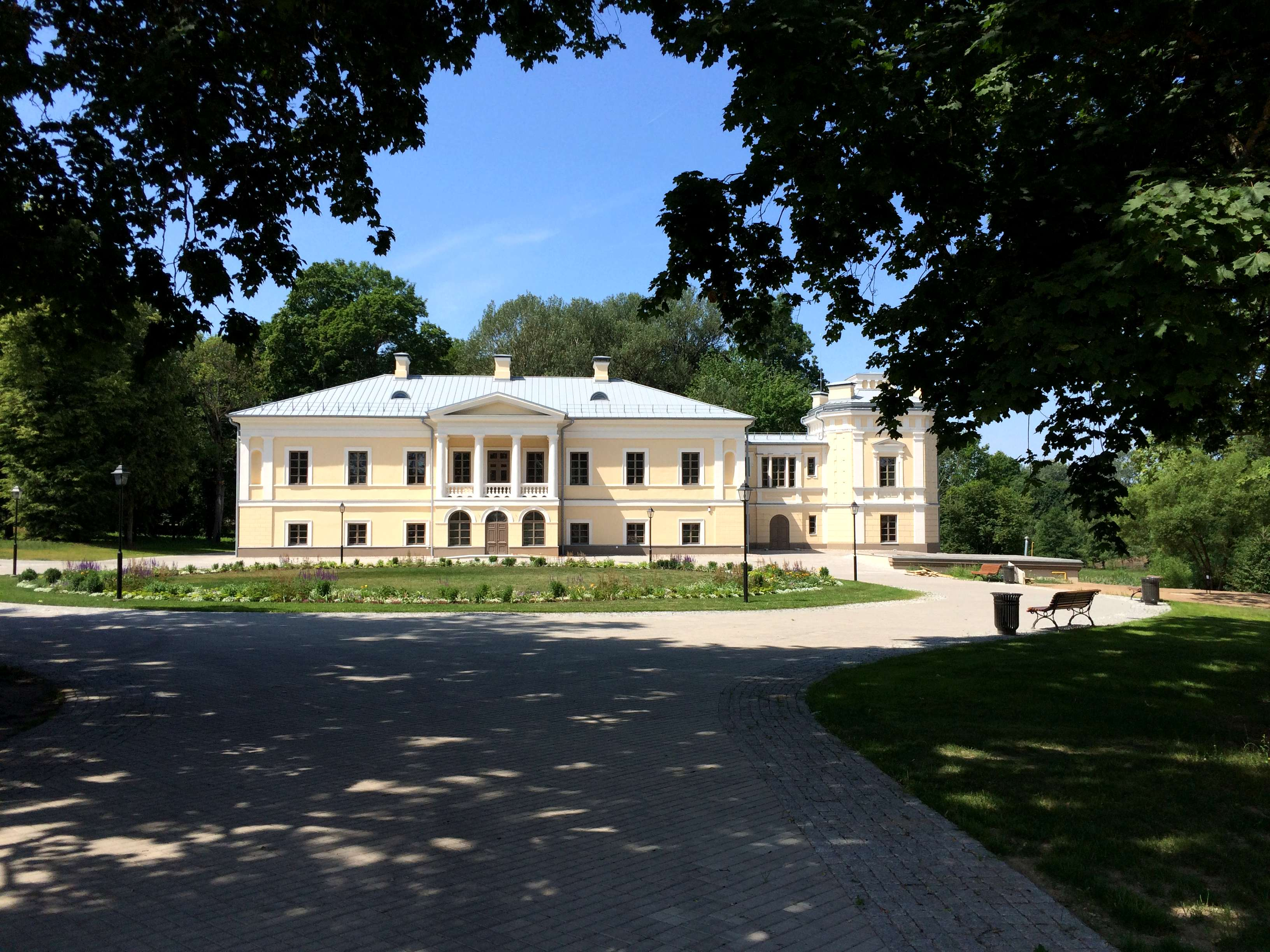 Jašiūnų dvaras